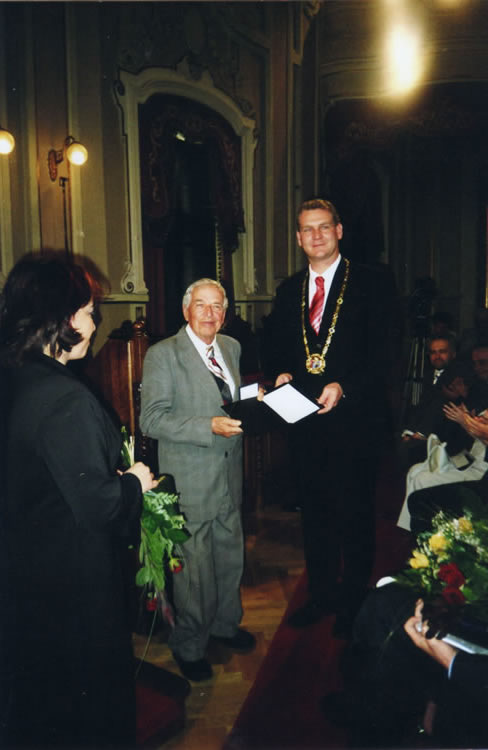 Szeged, 2006. május 21. vasárnap 11 óra Városháza, Széchenyi tér diszterem. Szeged napja. Kitüntetések átadása a Közgyűlésen. Szegedért emlékérem kitüntetettje: Hemmert János festőművész, szegedi helytörténész. Átadó: Dr. Botka László Szeged Megyei jogú város polgármstere, Országgyűlési képviselő. Fényképezte: Kószó Jenő